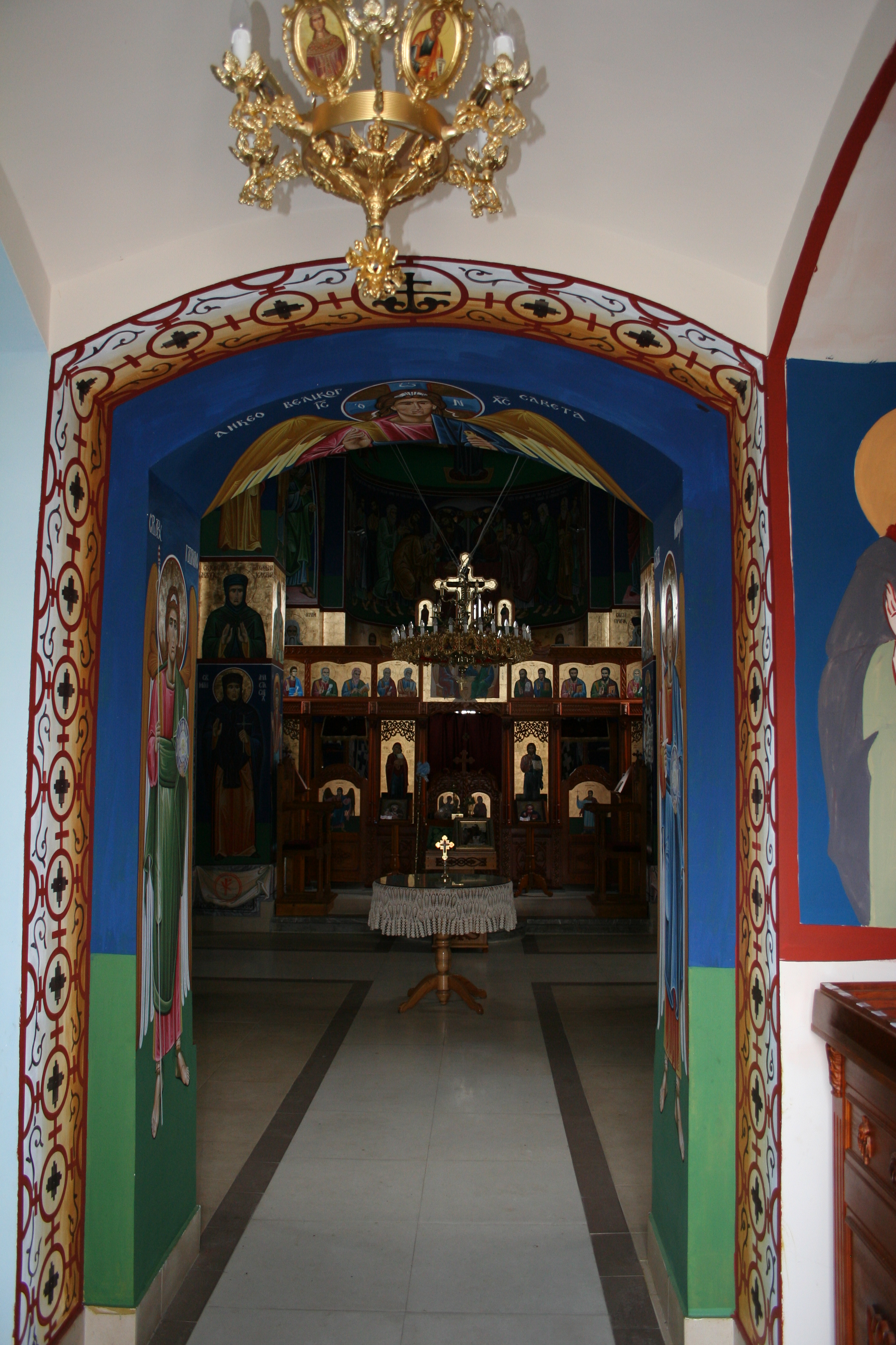 Crkva Svete Trojice u Zasavici II